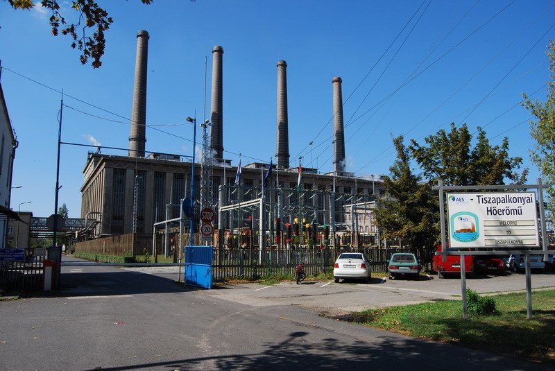 A "négykéményes régi erőmű" ezzel a létesítménnyel kezdődött Tiszaújváros története, mely már 1957-ben energiát szolgáltatott